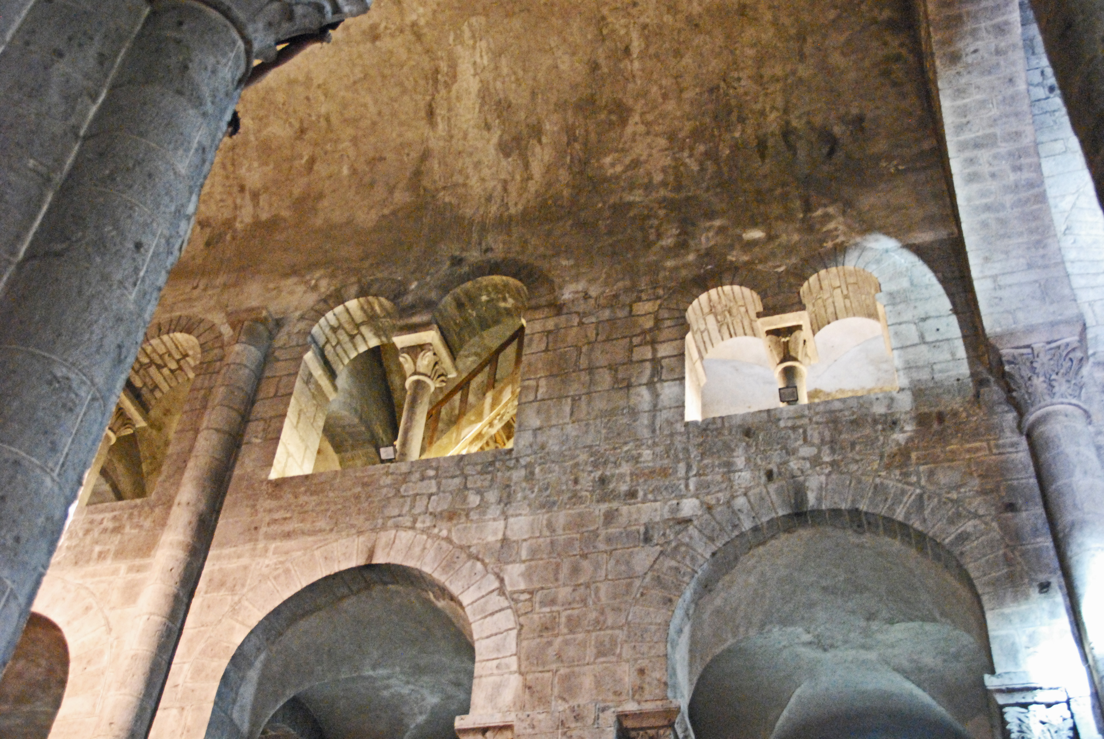 N.-D. d'Orcival, Mittelschiff, Südwand, Joched 2 u.1